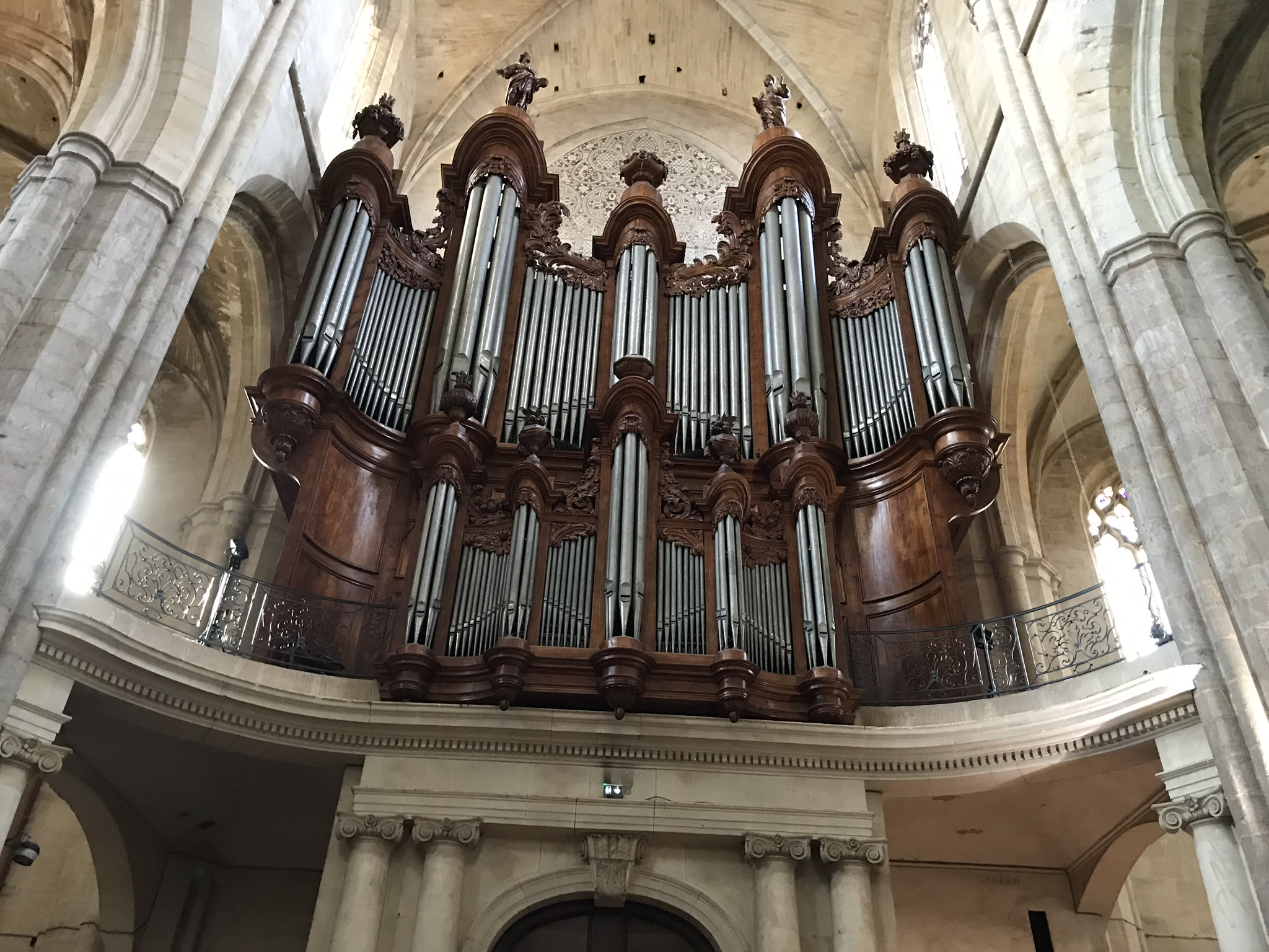 Grote 18e eeuwse orgel in de Maria Magdalena-basiliek in Saint Maximin, Zuid Frankrijk.